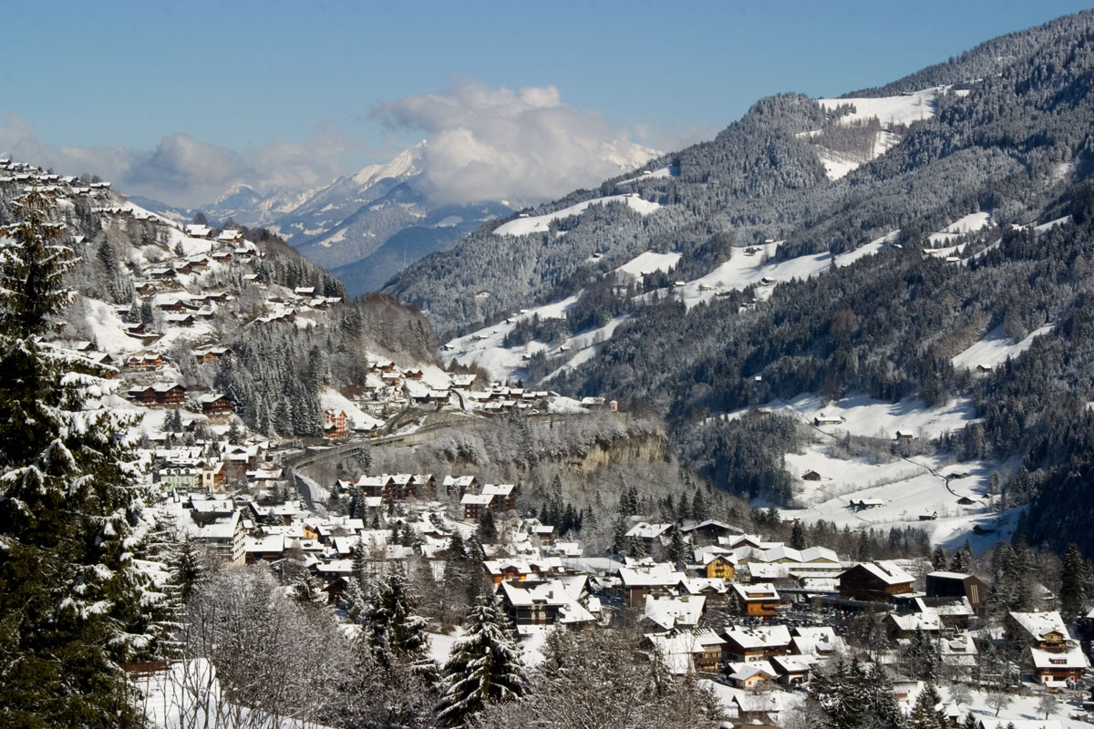 Champéry